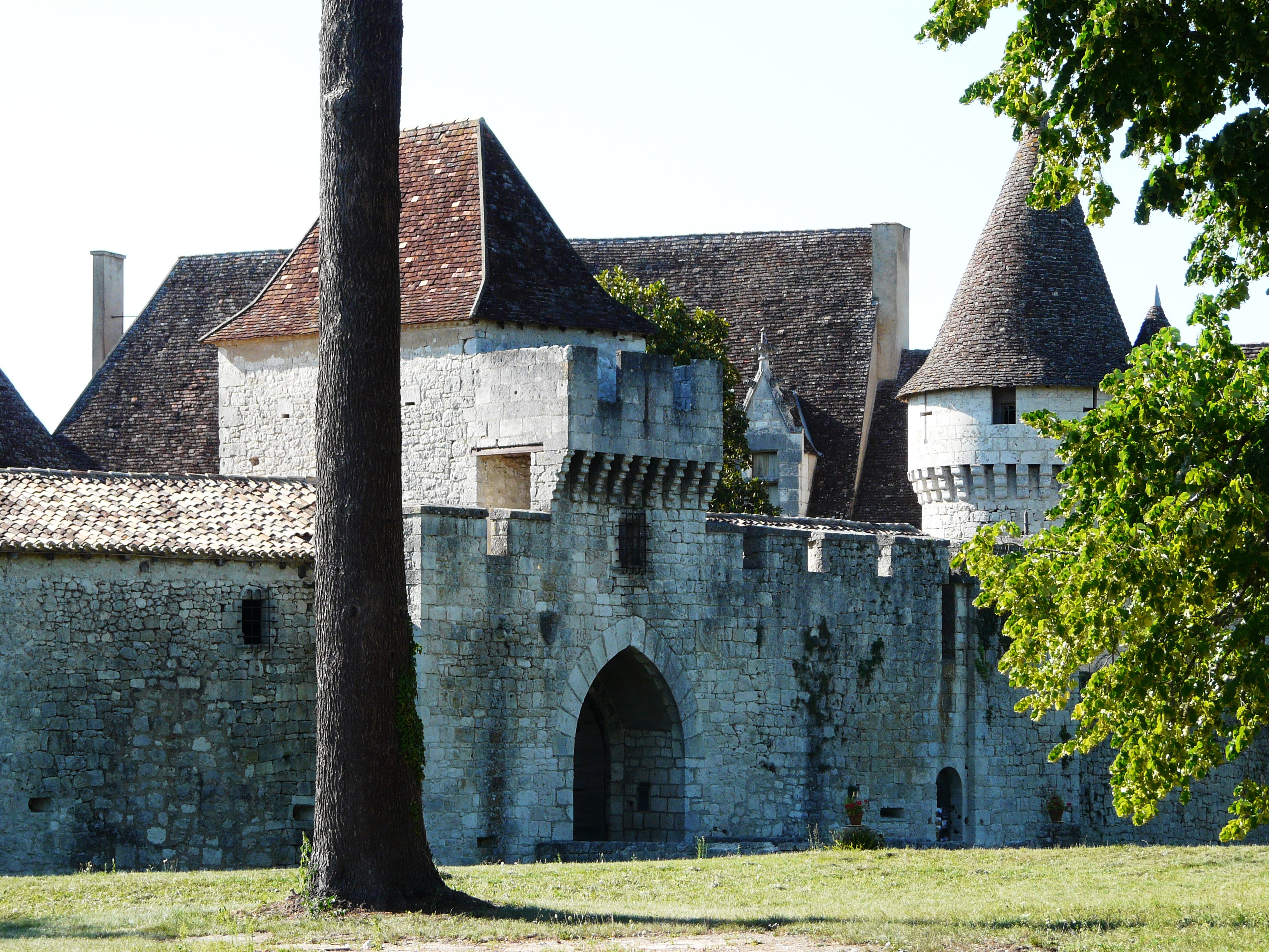 Le châtelet d'entrée du château de Bridoire, Ribagnac, Dordogne, France